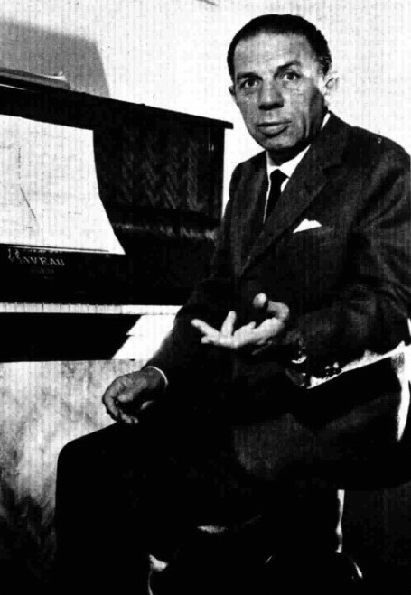 Il compositore Eldo Di Lazzaro